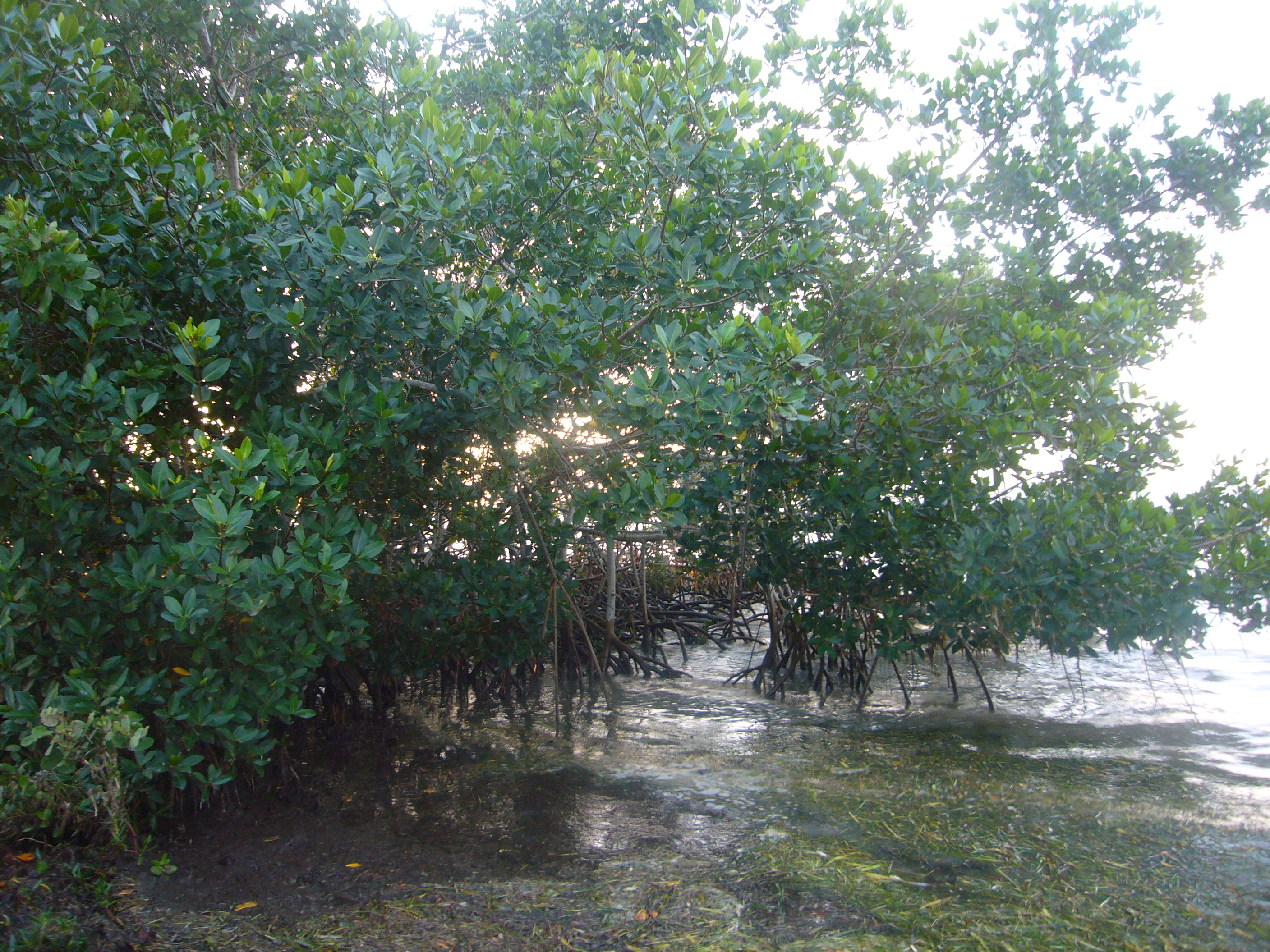 Rhizophora mangleКрасное мангровое дерево (Rhizophora mangle). Национальный парк Эверглейдс, США